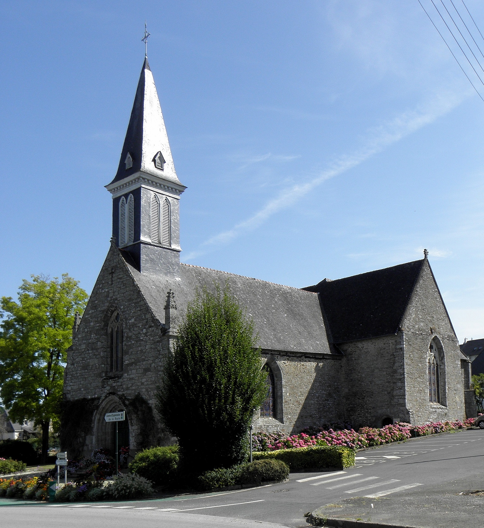 Église Saint-André de La Chèze (22).